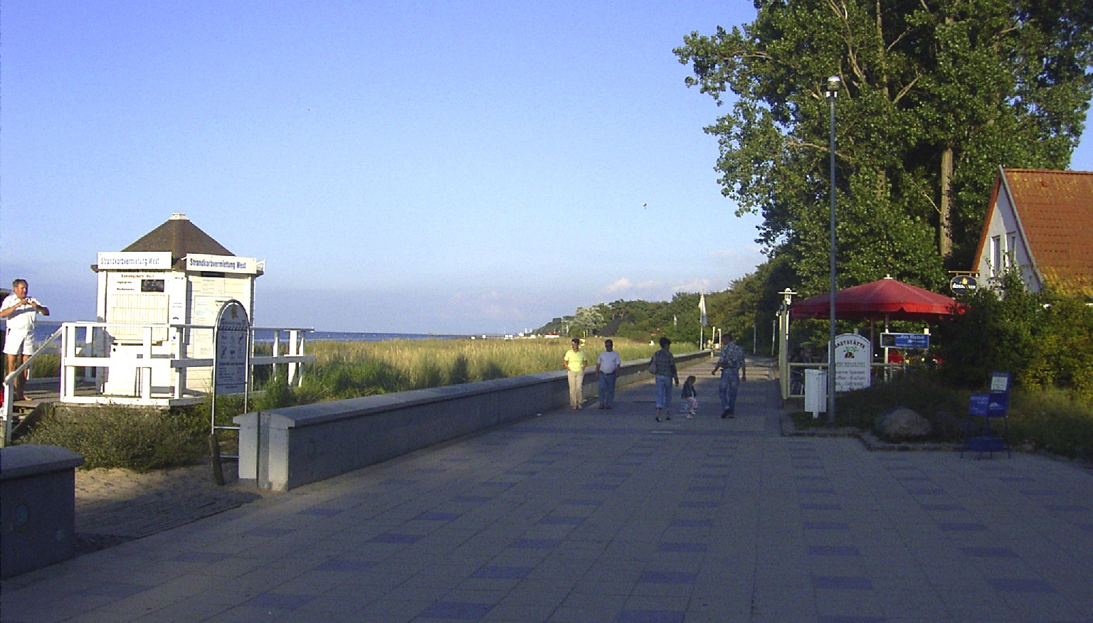 Strandpromenade von Kühlungsborn West (ehem. Arendsee)